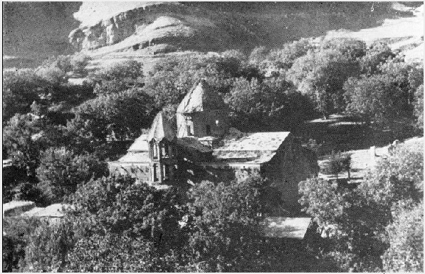 Ցղնայի սբ. Աստվածածին եկեղեցին St. Holy Mother Church of Tsghna